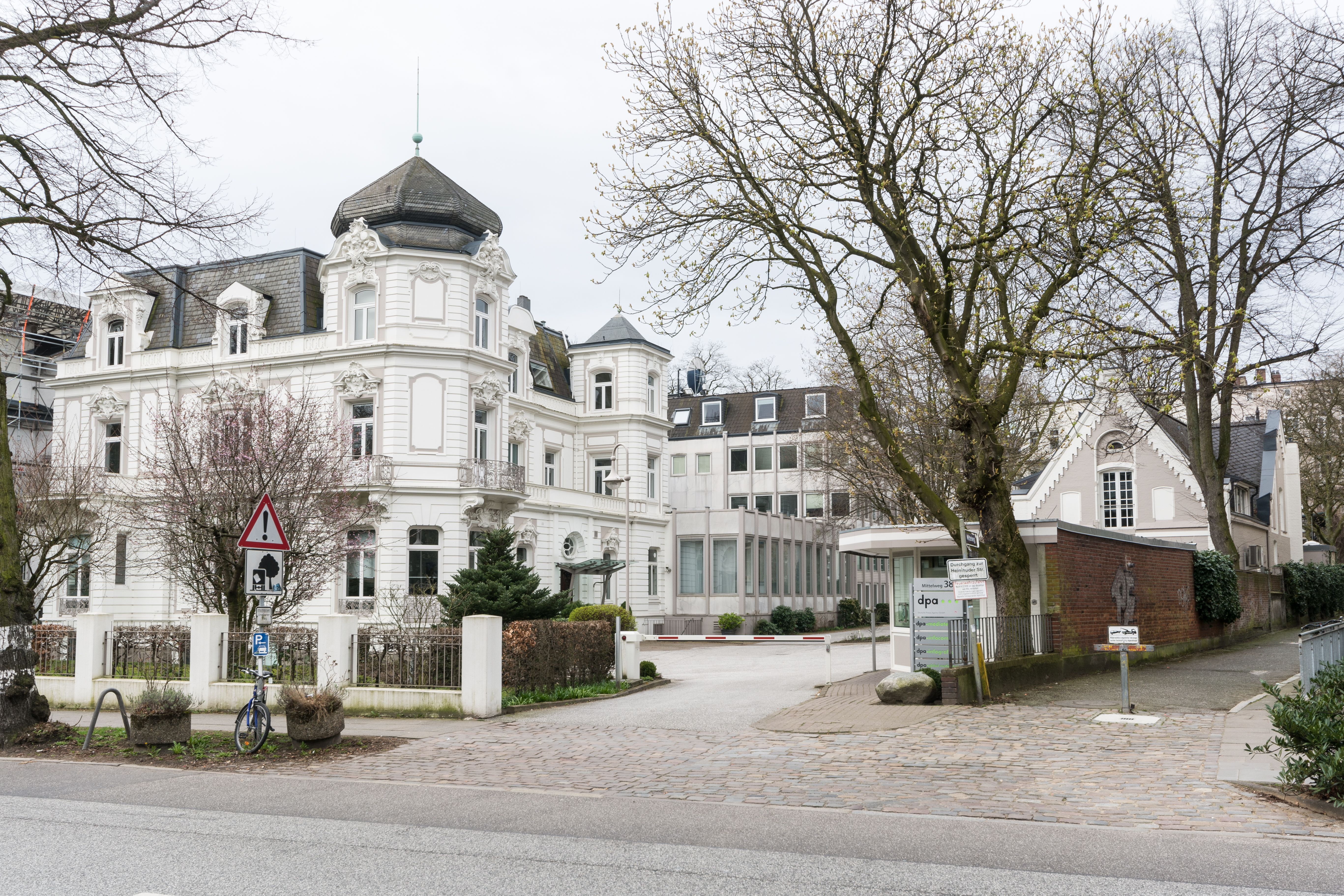 Ensemble Mittelweg 38, 38a in Hamburg-Rotherbaum, Sitz der Deutschen Presse-Agentur. This is a photograph of an architectural monument.